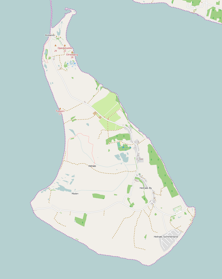 Kort over Helnæs fra OpenStreetMap - Helnæs, Danmark Kortets geografiske grænser: N: 55.182° S: 55.117° W: 9.965° E: 10.055°